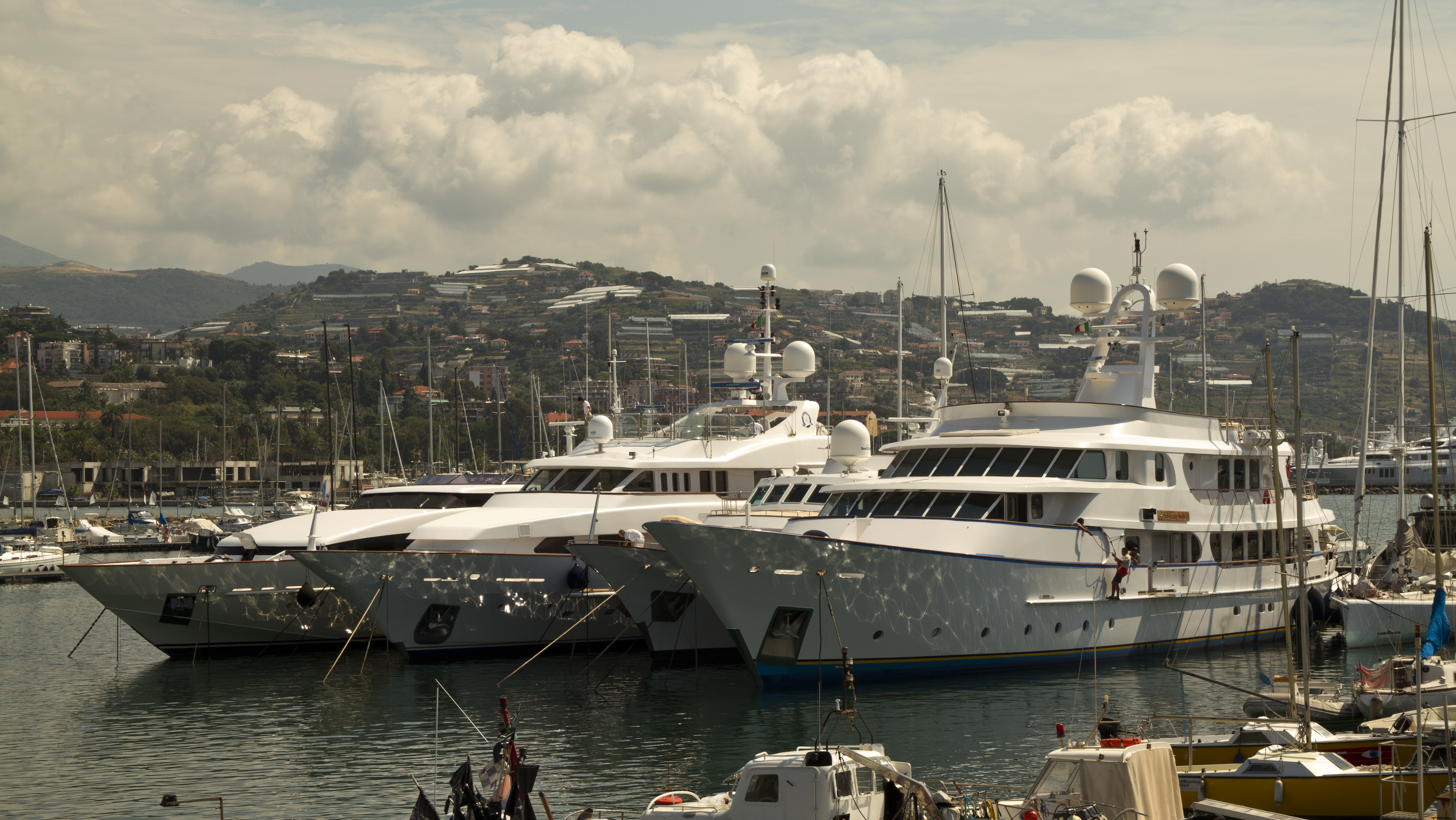 18038 Sanremo IM, Italy